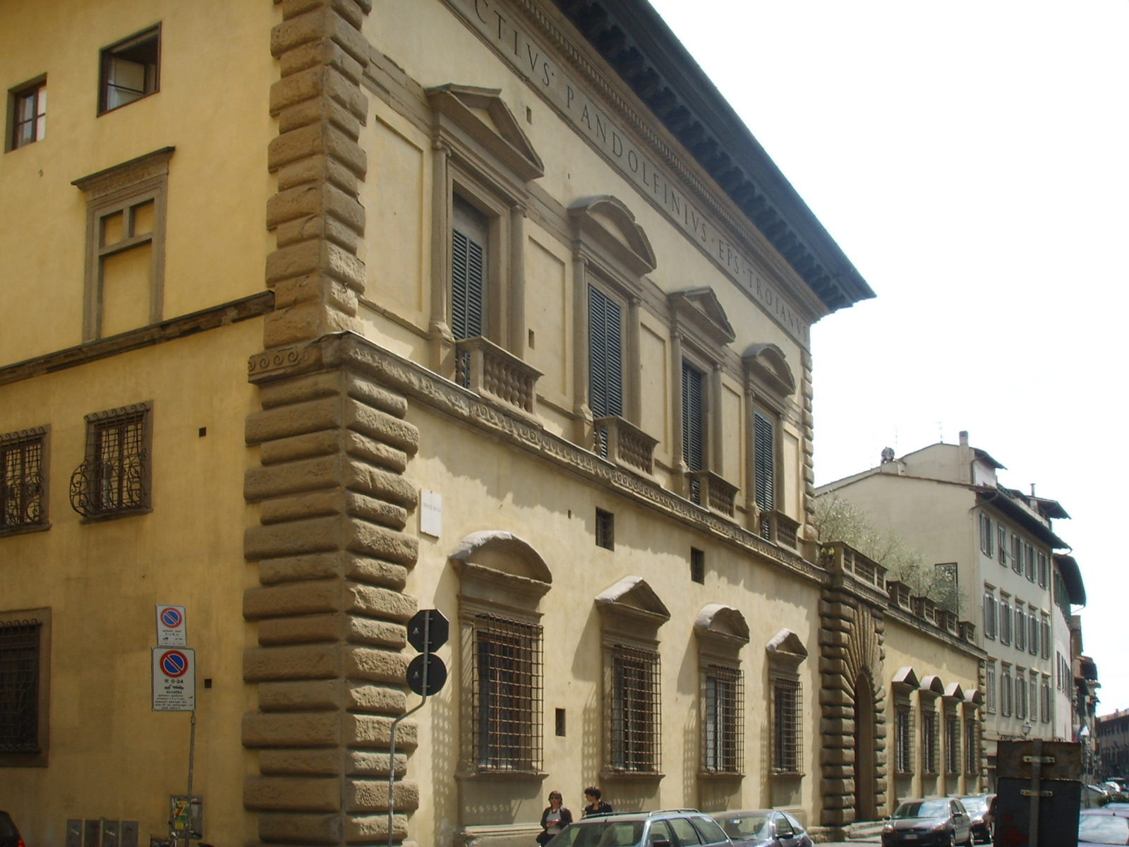 Palazzo Pandolfini, view 02 crop